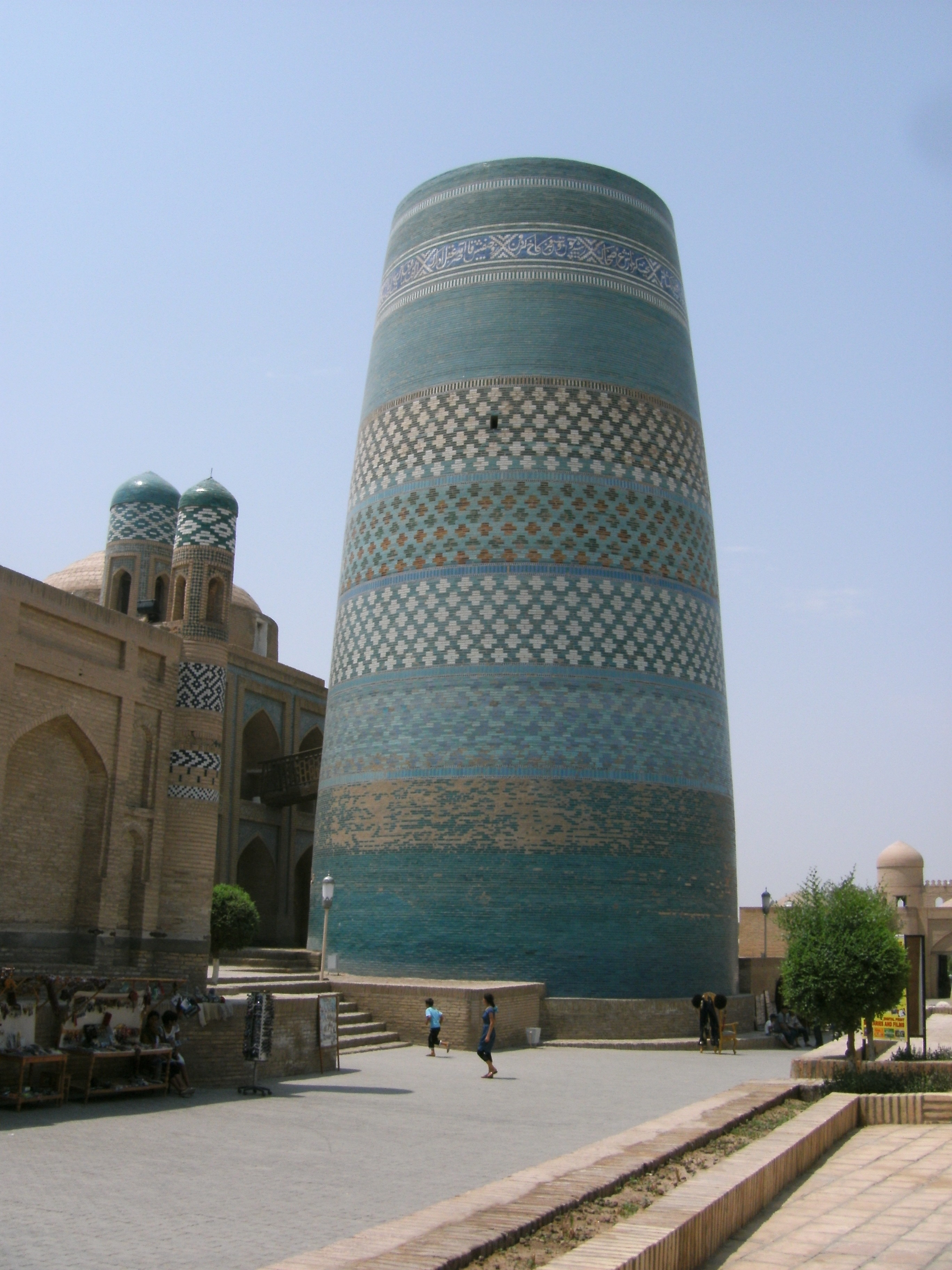 minaret Kalta Minor non terminé parce qu'il se serait écroulé si on avait continué à le construire. Il se trouve en Ouzbékistan à Khiva